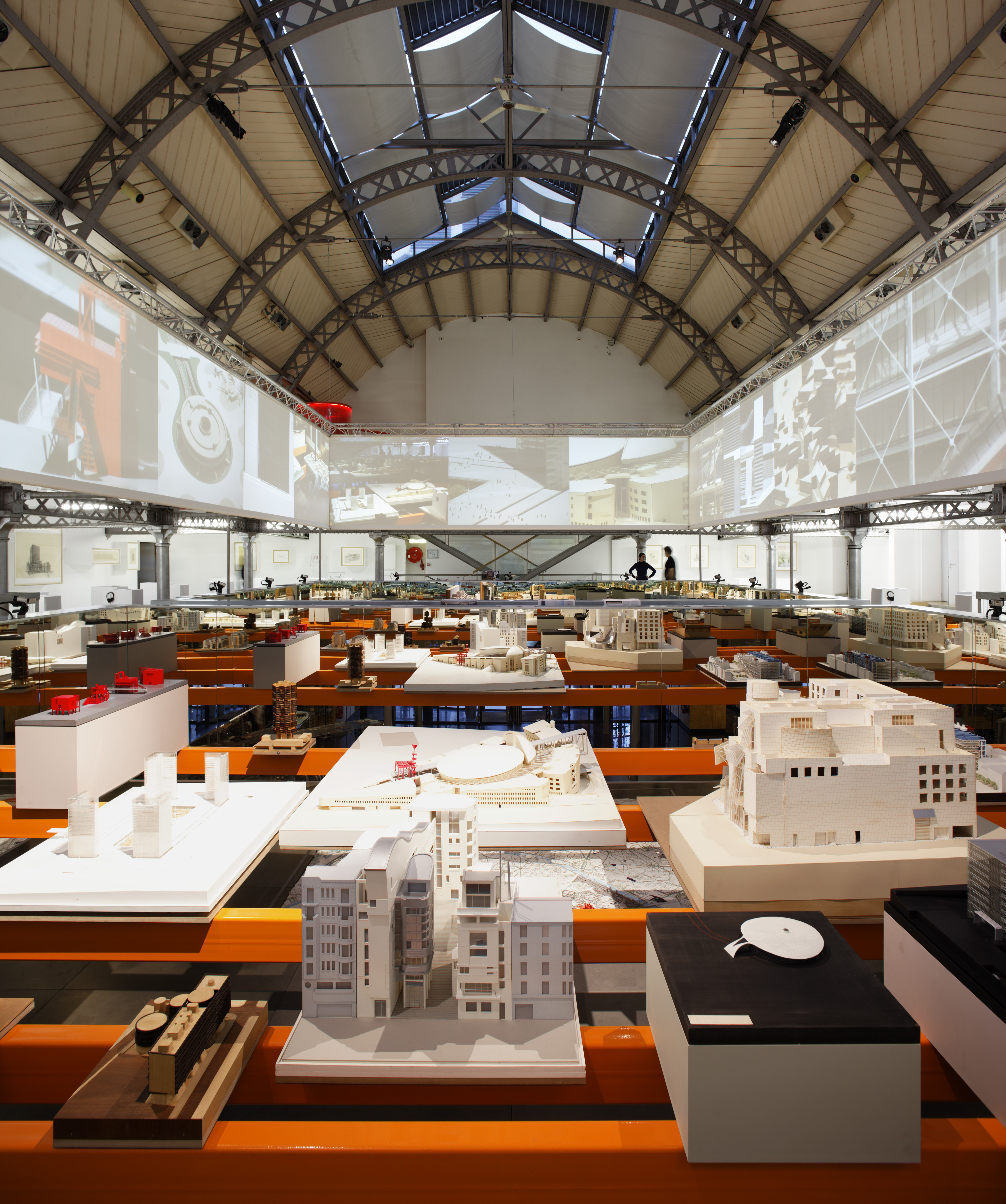 OEUVRES CONSTRUITES 1948- 2009 ARCHITECTURES DE COLLECTION PARIS ÎLE-DE-FRANCE